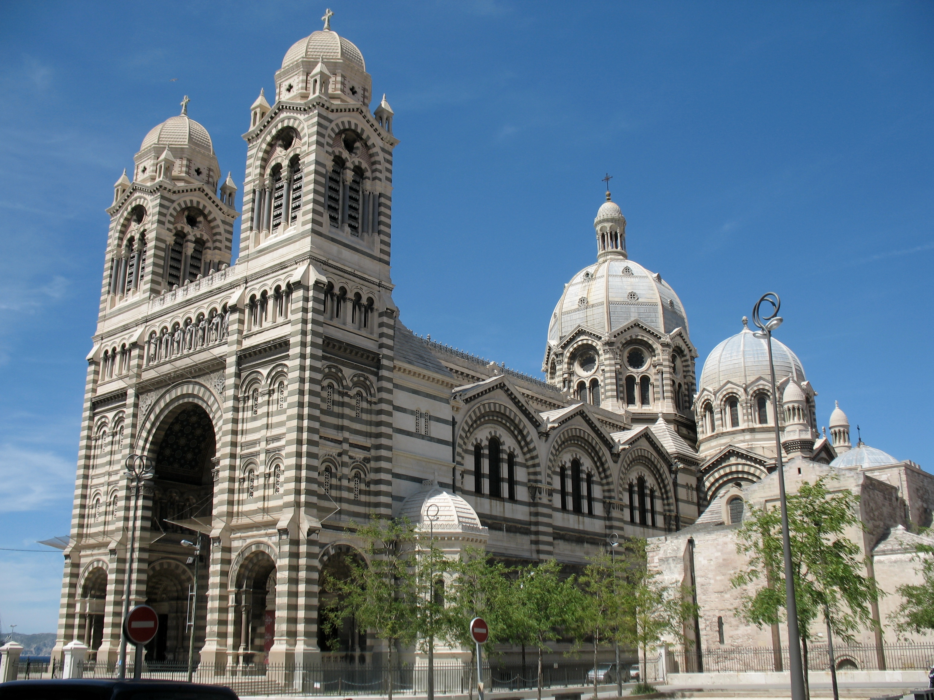 Cathédrale Sainte-Marie-Majeure, dite Nouvelle Major .